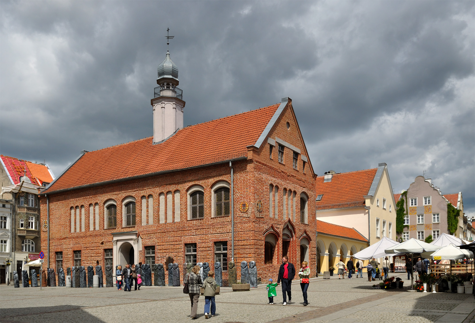 Stary Ratusz, 1623, XVIII-XX ul. Stare Miasto 33, Olsztyn